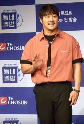 9일 오후 서울시 영등포구 여의도 서울마리나에서 TV조선 '동네앨범' 제작발표회가 열려 가수 KCM, 권혁수가 참석해 포토타임을 갖고 있다.